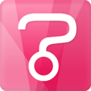 Cette image correspond au logo de